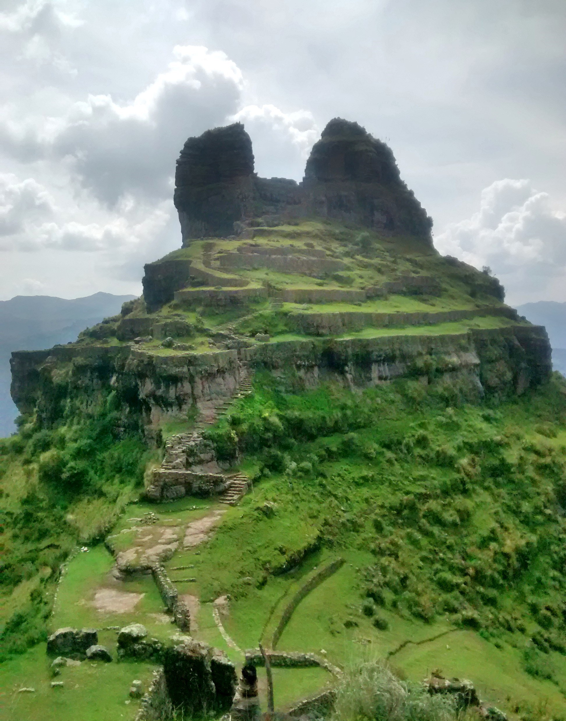 Monumento arqueológico de Waqrapukara, ubicado en el distrito de Acos, provincia de Acomayo, en Cusco, reconocida como Patrimonio Cultural del Ministerio de Cultural mediante la resolución viceministerial N° 128-2017. El cronista Felipe Guaman Poma de Ayala se refiere que probablemente se construyó en el apogeo del general Inca T'ito Kcosñipa, en el periodo del Inca Capa yupanqui, esta ubicada al sur de la ciudad de Cusco, aprox. a 130 km en el distrito de pomacanchi,.provincia de Acomayo y departamento de cusco, se encuentra a 3,160 msnm. aprox.